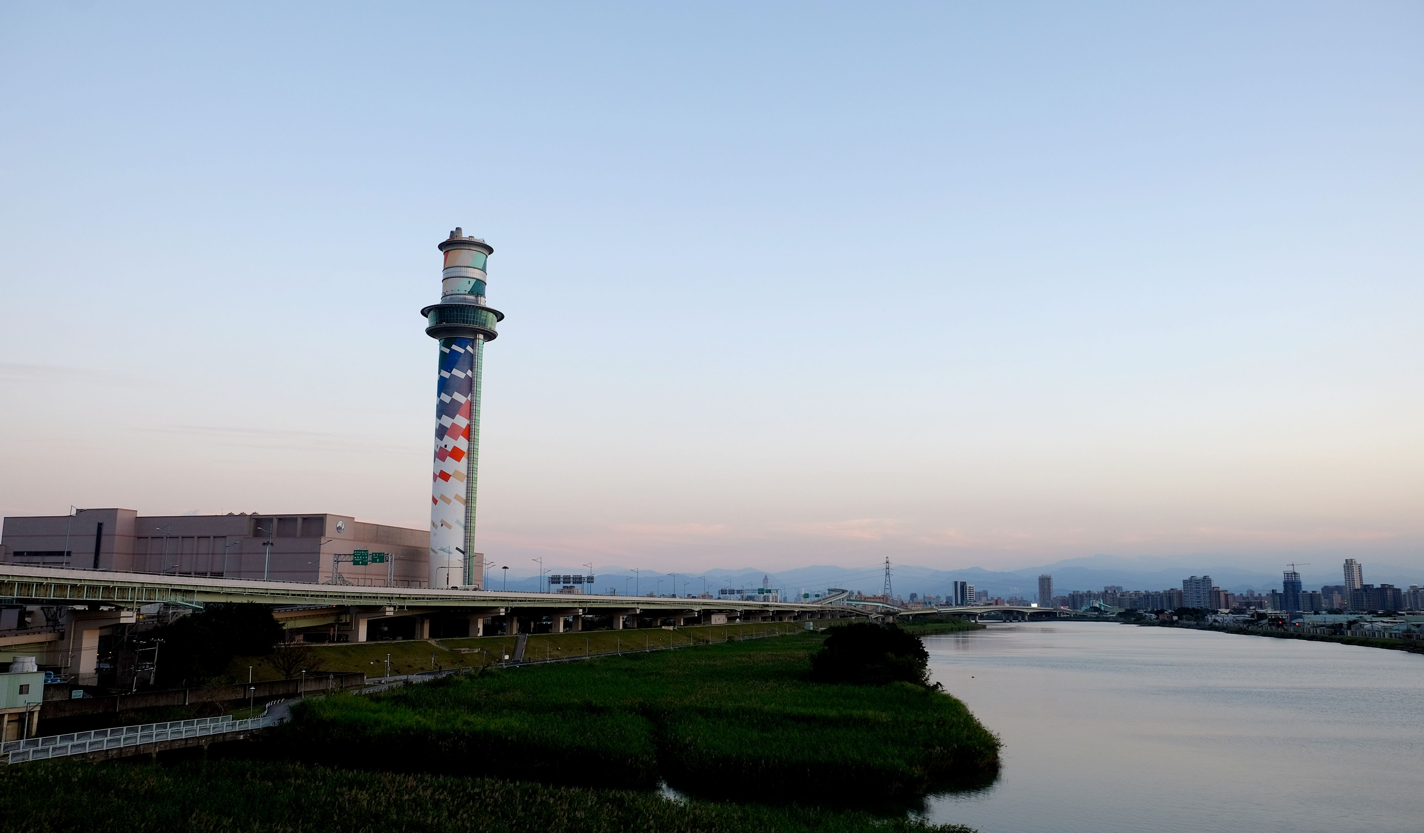 北投垃圾焚化廠